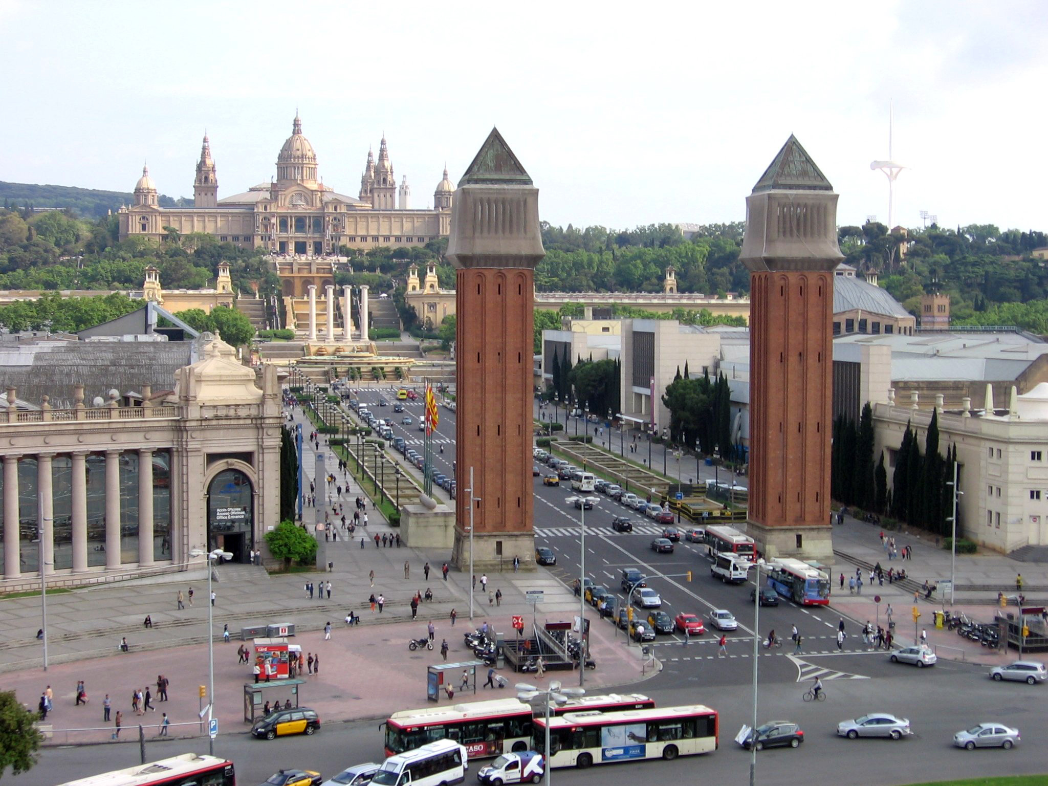 Torres venecianas de la plaza de España, Barcelona.